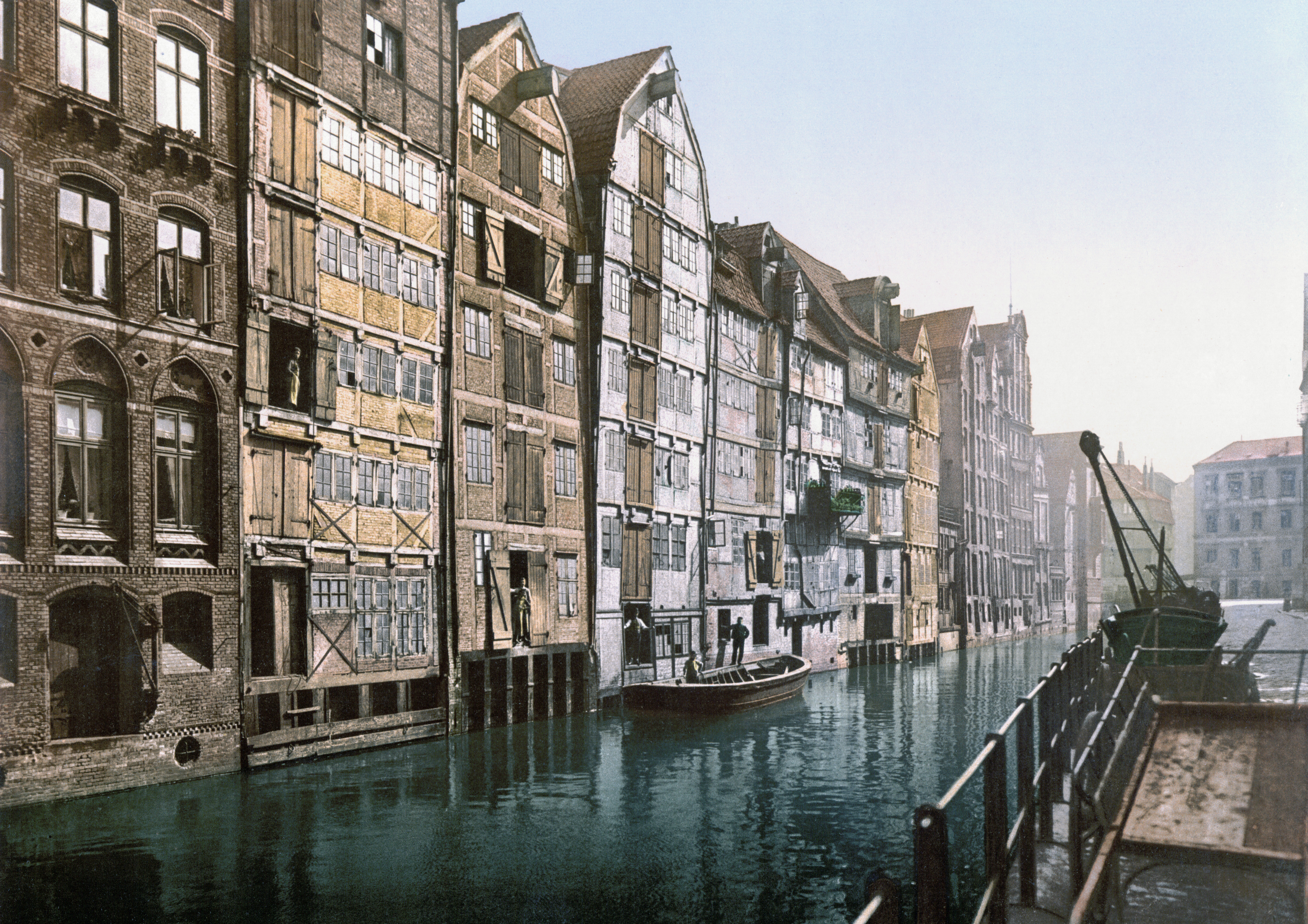 Hamburg, Holländischer Brook ca. 1890-1900, vor dem Abriss zum Bau der Speicherstadt.